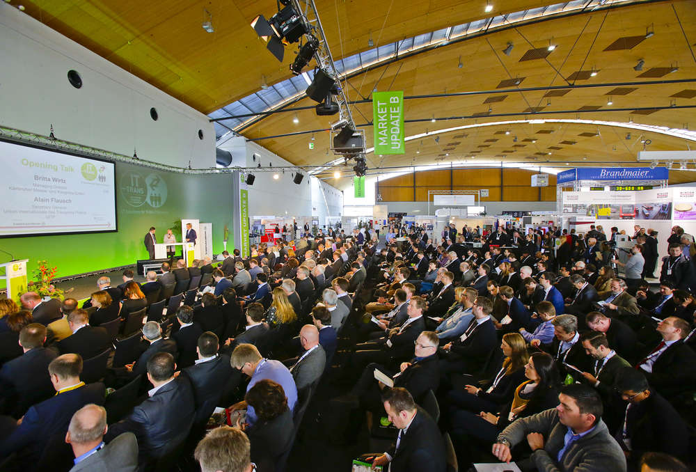 Britta Wirtz, Geschäftsführerin der Karlsruher Messe- und Kongress GmbH, und Alain Flausch, Secretary General des Internationalen Verbands für öffentliches Verkehrswesen (UITP), eröffnen die IT-Trans 2016 auf der Bühne eines Market Update Forums